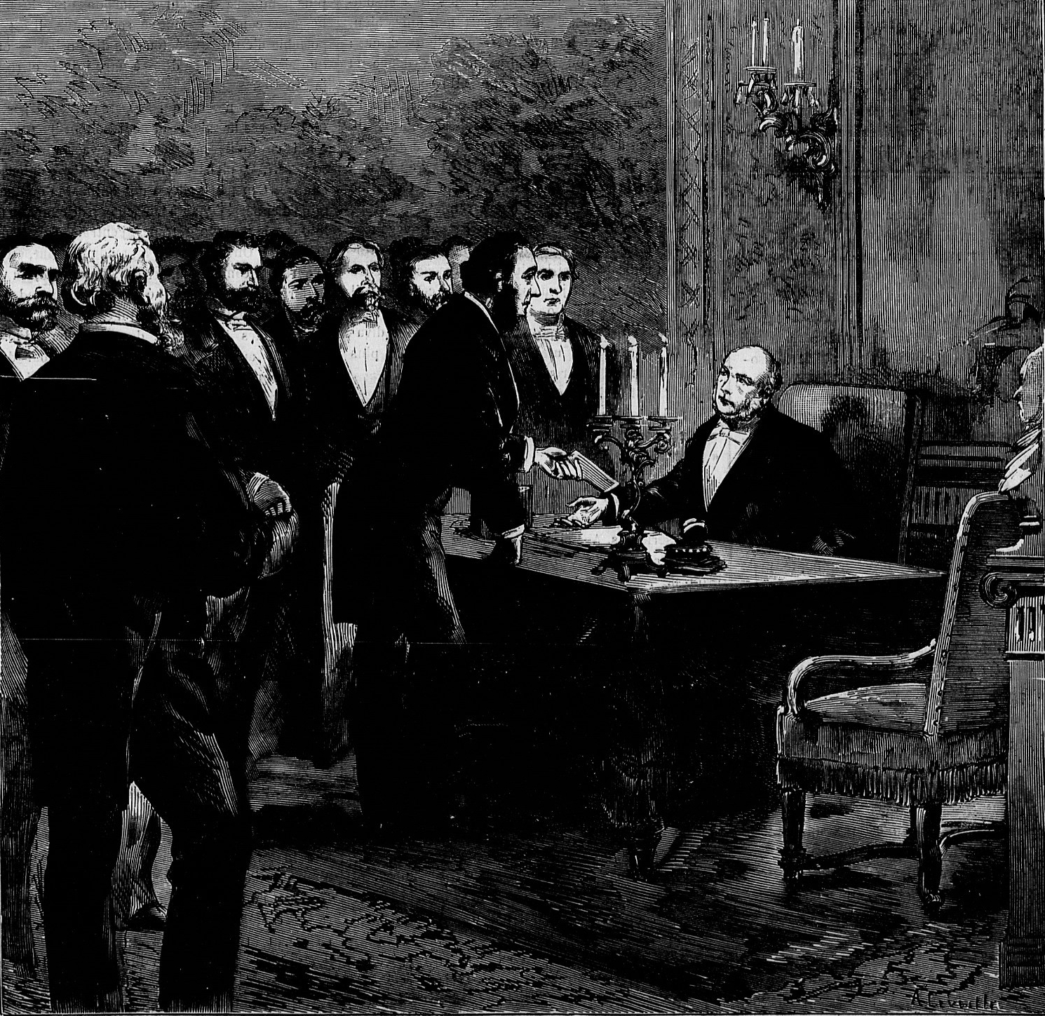 Une séance de cabinet à l’Élysée pendant la crise ministérielle de la rentrée parlementaire de l'automne 1880.